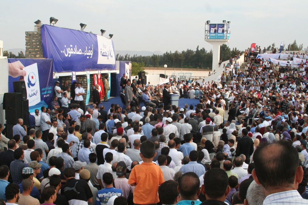 Début de la campagne du parti Ennahda à Sidi Bouzid